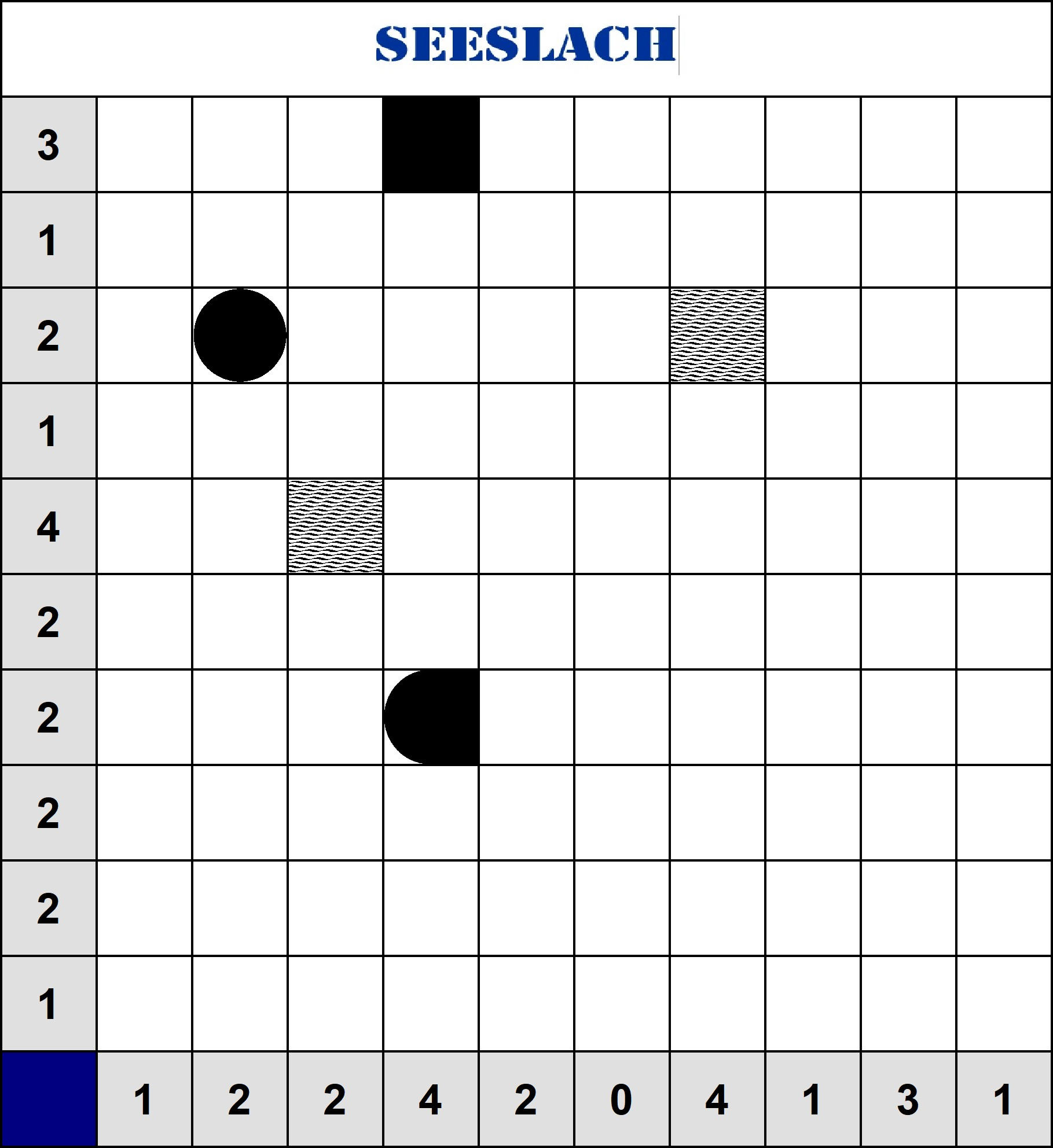 Opgave voor een Zeeslagpuzzel